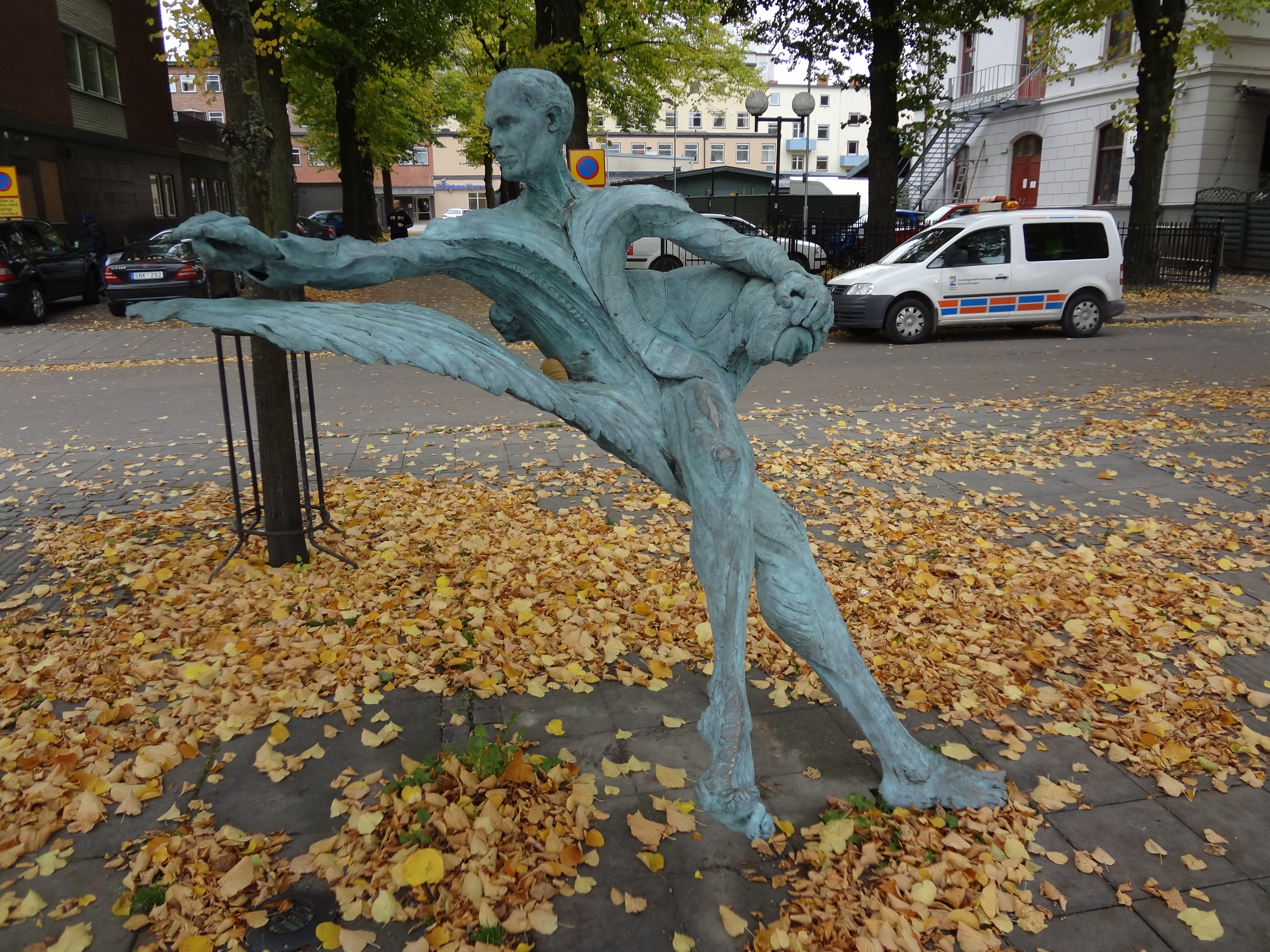 Staty på J A Selanders gata, gjord av Richard Brixel föreställande Johannes Anton Selander. Text på skylt på platsen: "J.A. Selander (1887-1964). Legendarisk chefredaktör på Eskilstuna-Kuriren åren 1920-1963. Orädd försvarare av rättvisa och demokrati. Kraftfull motståndare till nazismen under andra världskriget. Statyn rest den 14 november 2005 av Eskilstuna-Kurirens Stiftelse. Konstnär Richard Brixel."